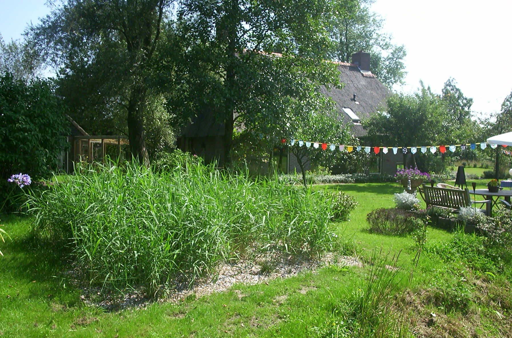 Een IBA 3A klasse helofytenfilter nabij woning